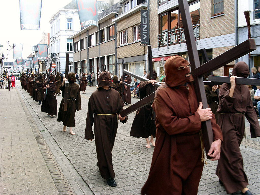 Veurne - Penitential Procession